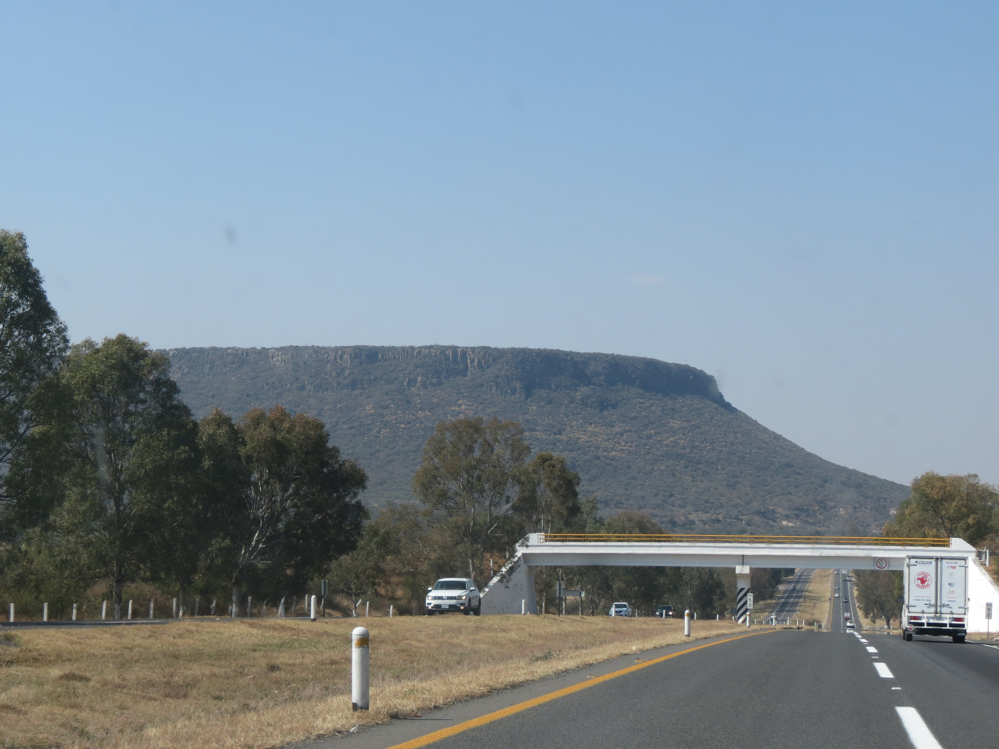 Vista de la 'Mesa redonda' (Jalisco) desde la carretera León-Aguascalientes.